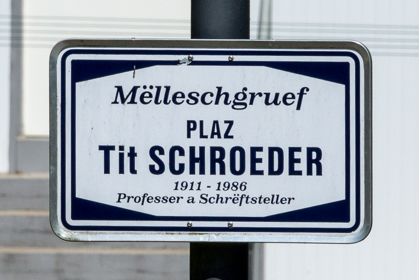 Stroosseschëld zu Useldeng.